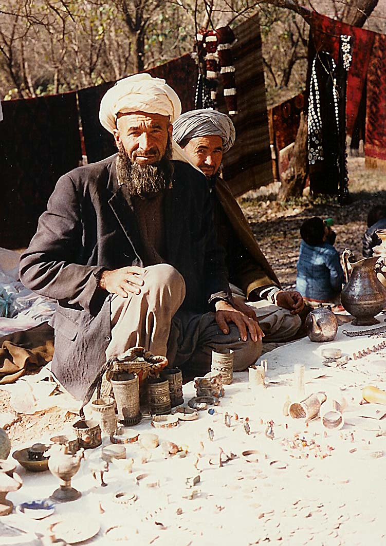 De Maart zu Islamabad (ëm 1987).